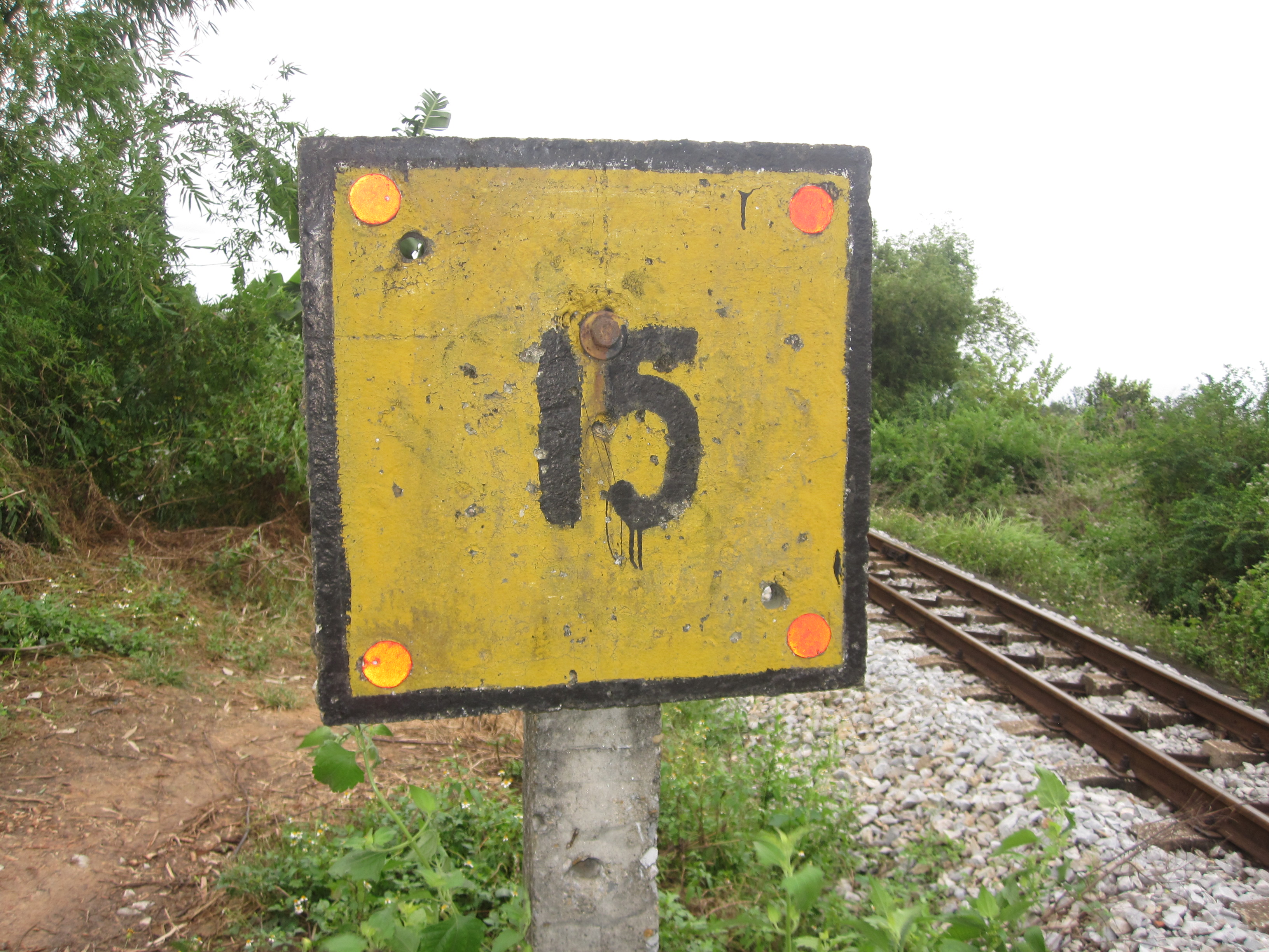 biển báo tốc độ tàu tối đa cho phép